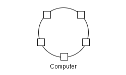 Rangtopologie (Oktober 2005).